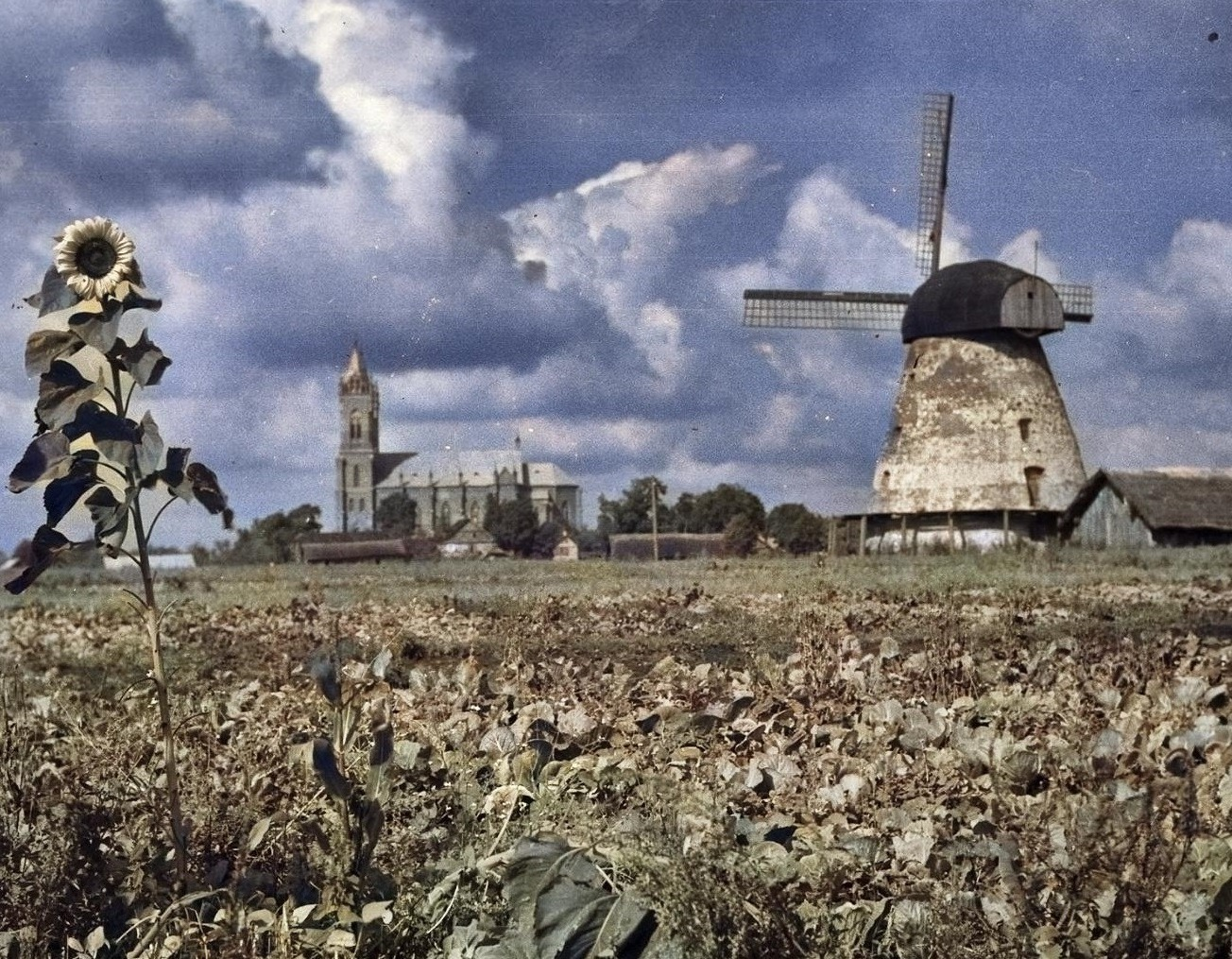 Vėjo malūnas Kupiškyje XX a. 3-4 deš.